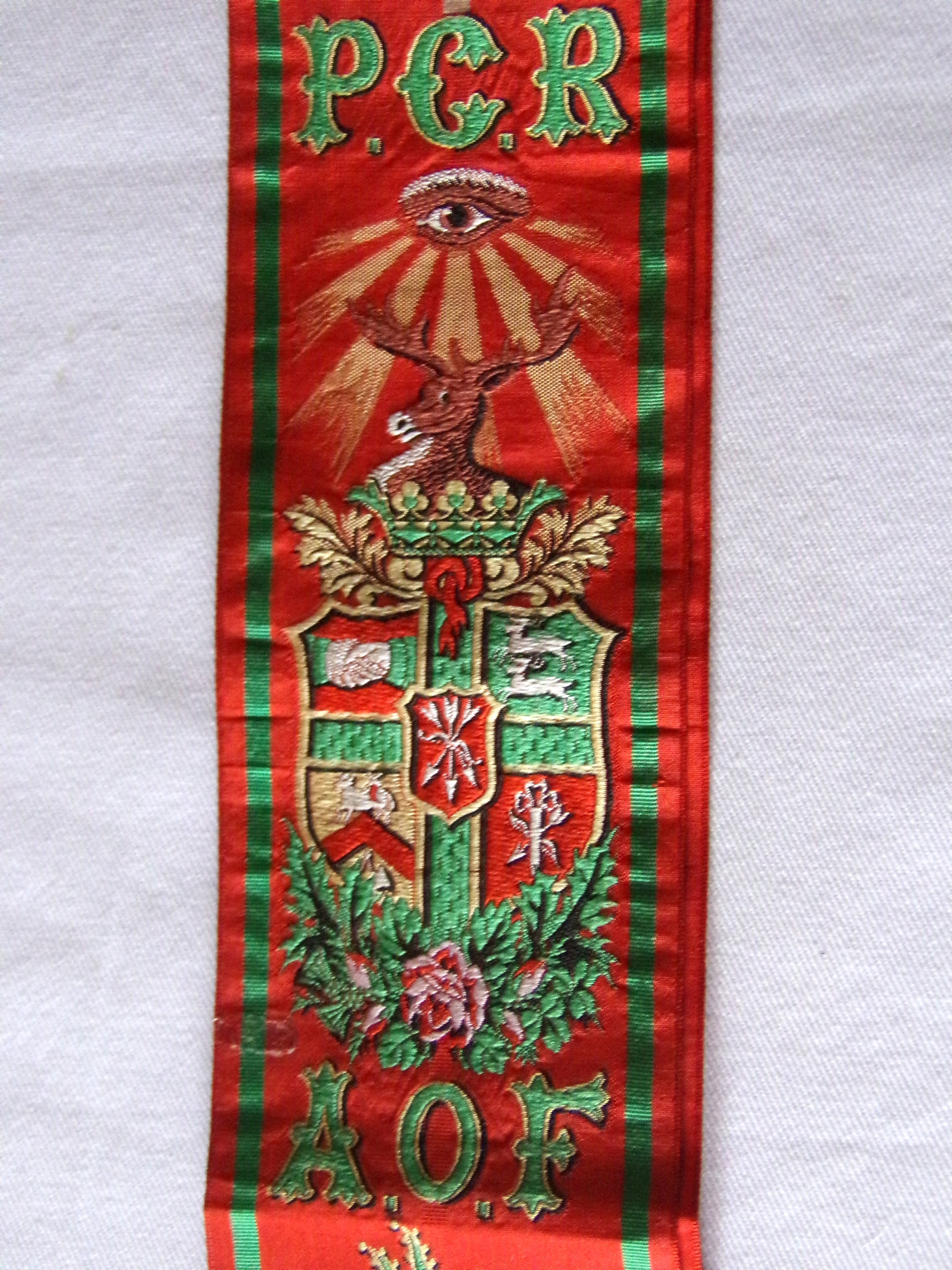 Détail d'un cordon de Past Chief Ranger - Ancient Order of Forersters